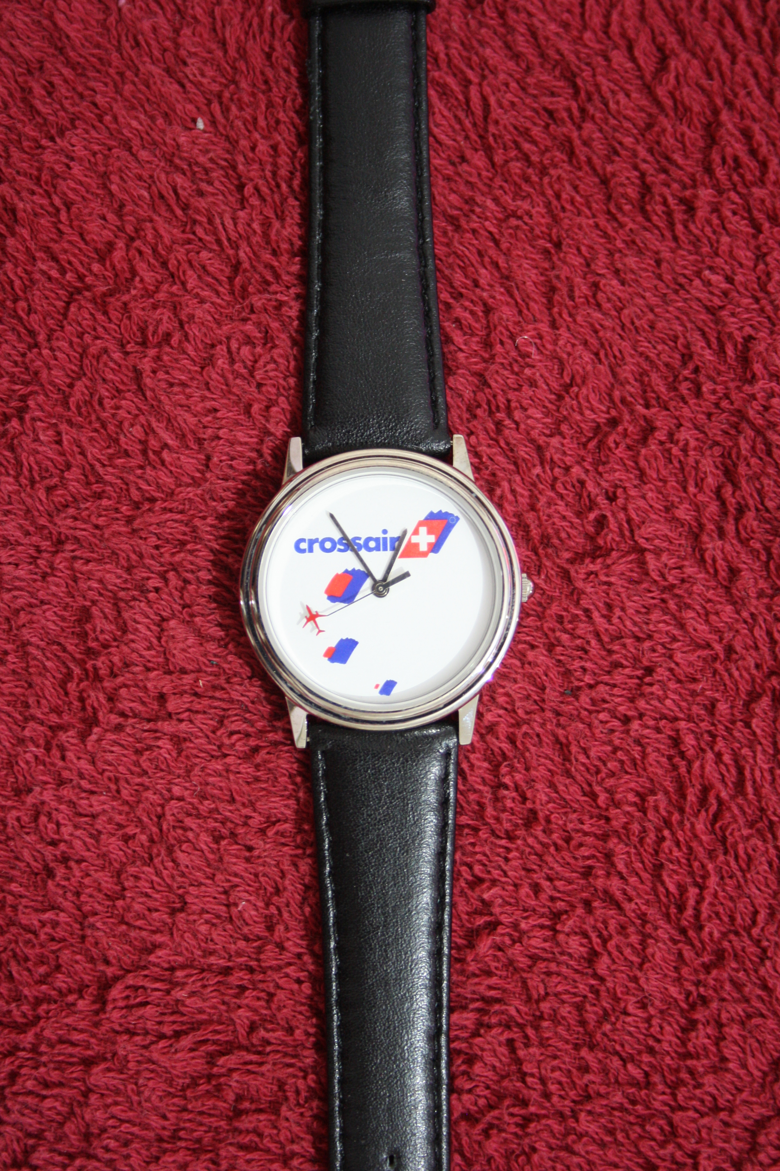 Crossair Werbeuhr, Nr. 817 Quarz, Swiss Made